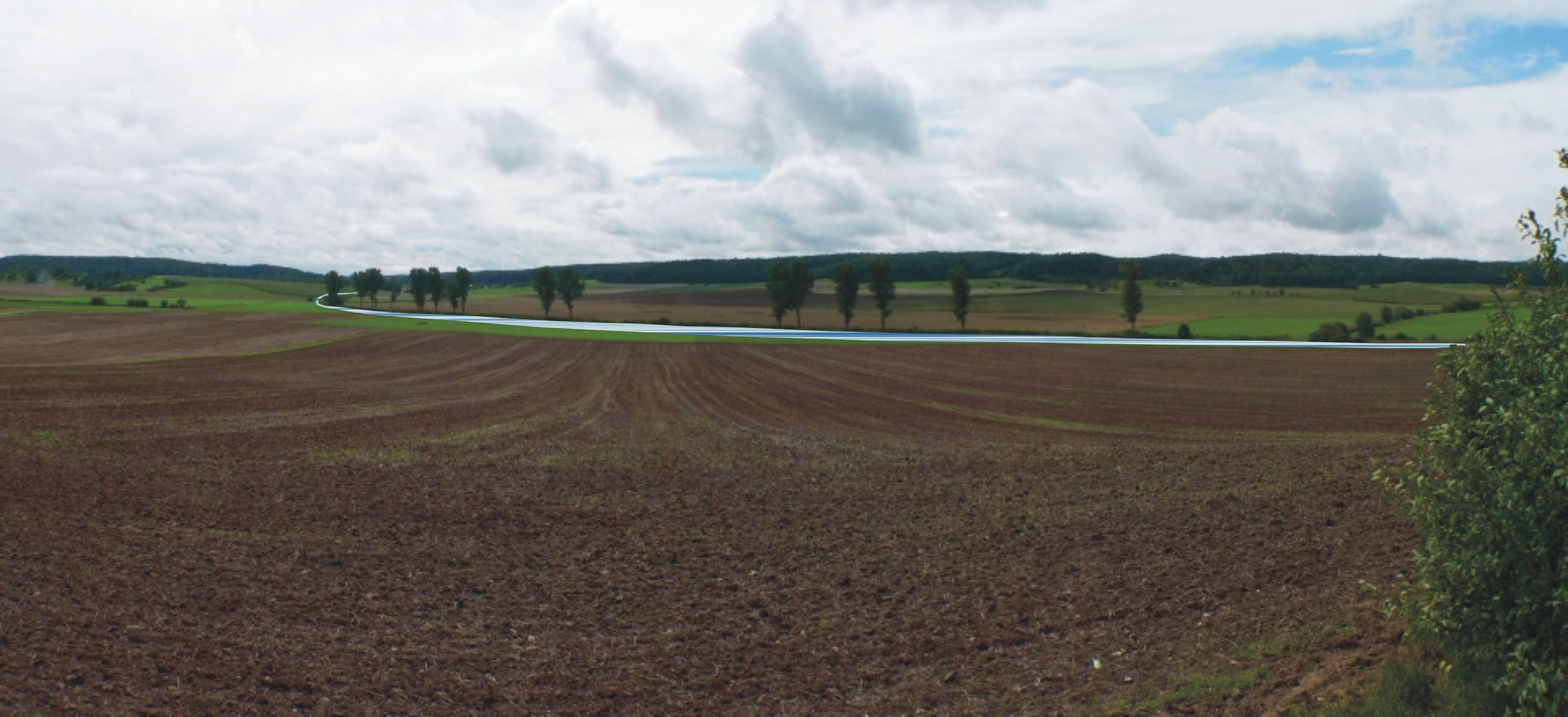 Main-Werra-Kanal (Deutschland): 1924-1961 geplanter möglicher Verlauf des Kanals südwestlich von Streufdorf entlang der Rodach. Bau des Kanals wurde nie begonnen und 1961 verworfen. Landschaftsfoto real, Kanalverlauf montiert.